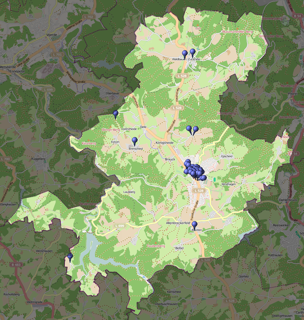 Karte der Lage aller Baudenkmäler in Breckerfeld, Stand Februar 2013